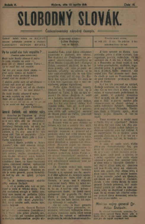 Titulný list týždenníka Slobodný Slovák, ktorý vychádzal na Slovensku v r. 1918 - 1920.